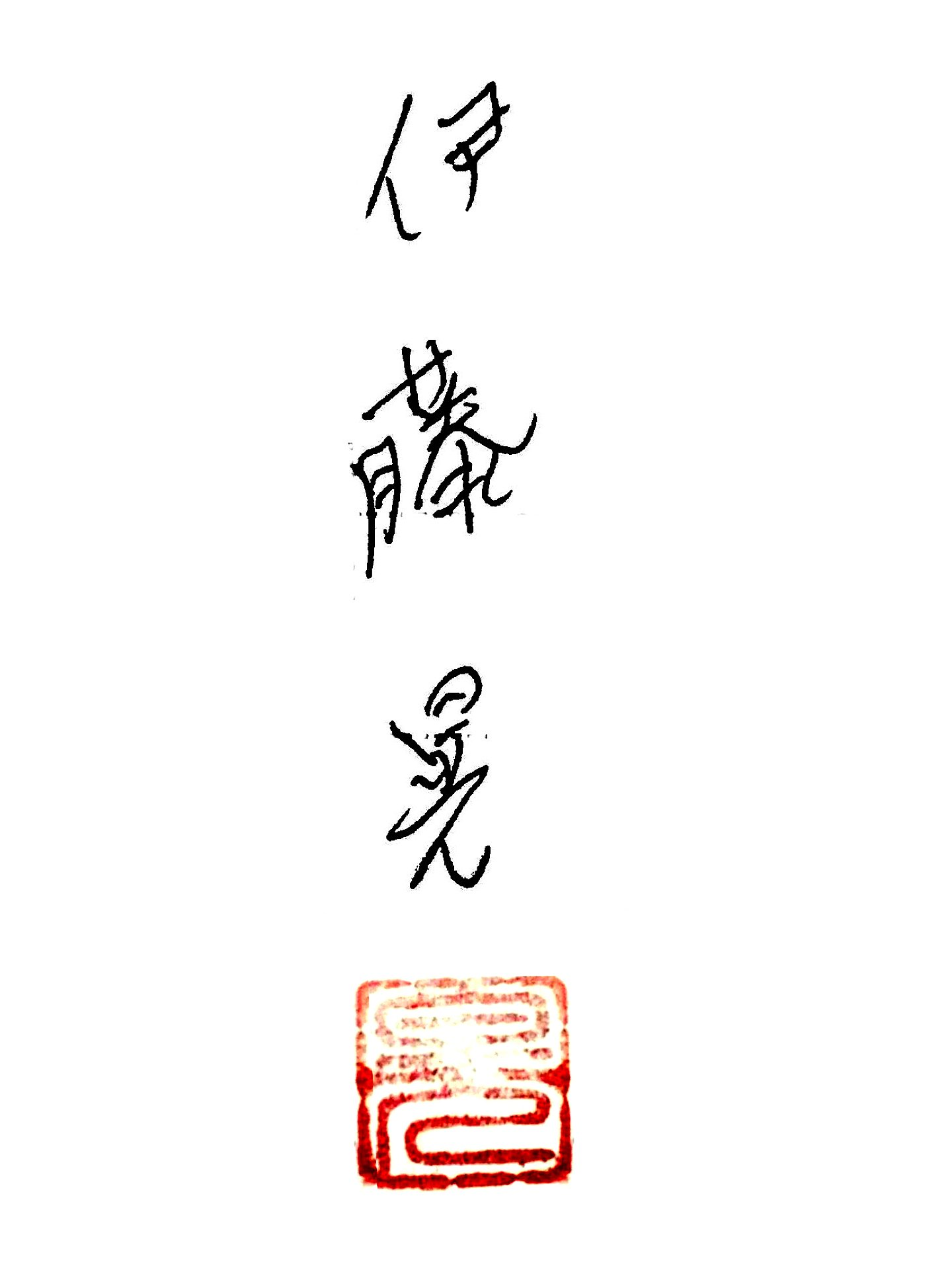 作家・伊藤晃先生のサイン